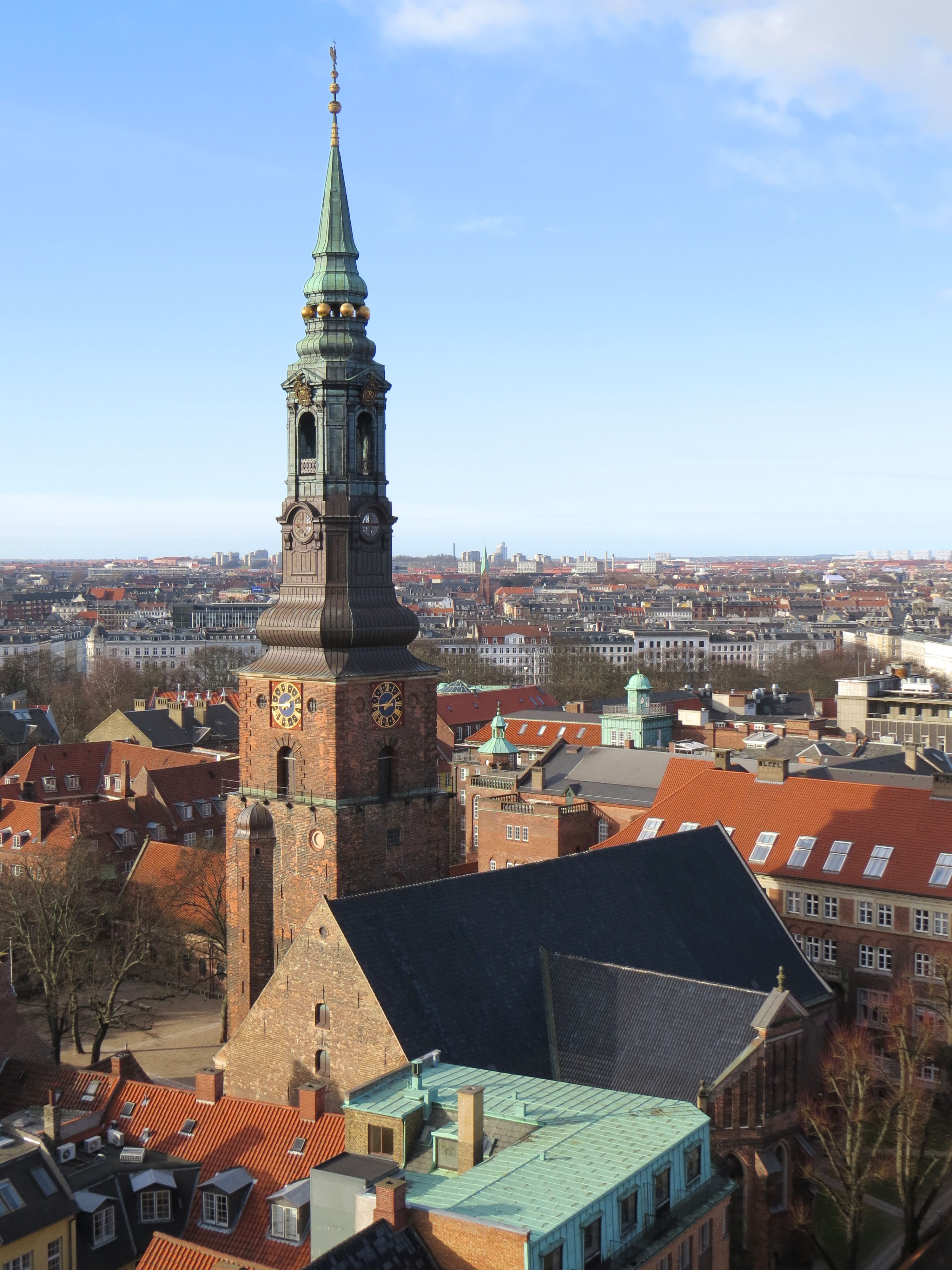 Sankt Petri Kirke, København